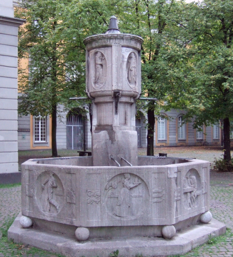 Carl Burger: Studentenbrunnen (1913) 1985 Restauration und Wiederaufbau des Brunnens – Steinmetzarbeiten C. Meisen Material: Muschelkalkstein Ort: Bonn – Universität-Hauptgebäude an der Schlosskirche